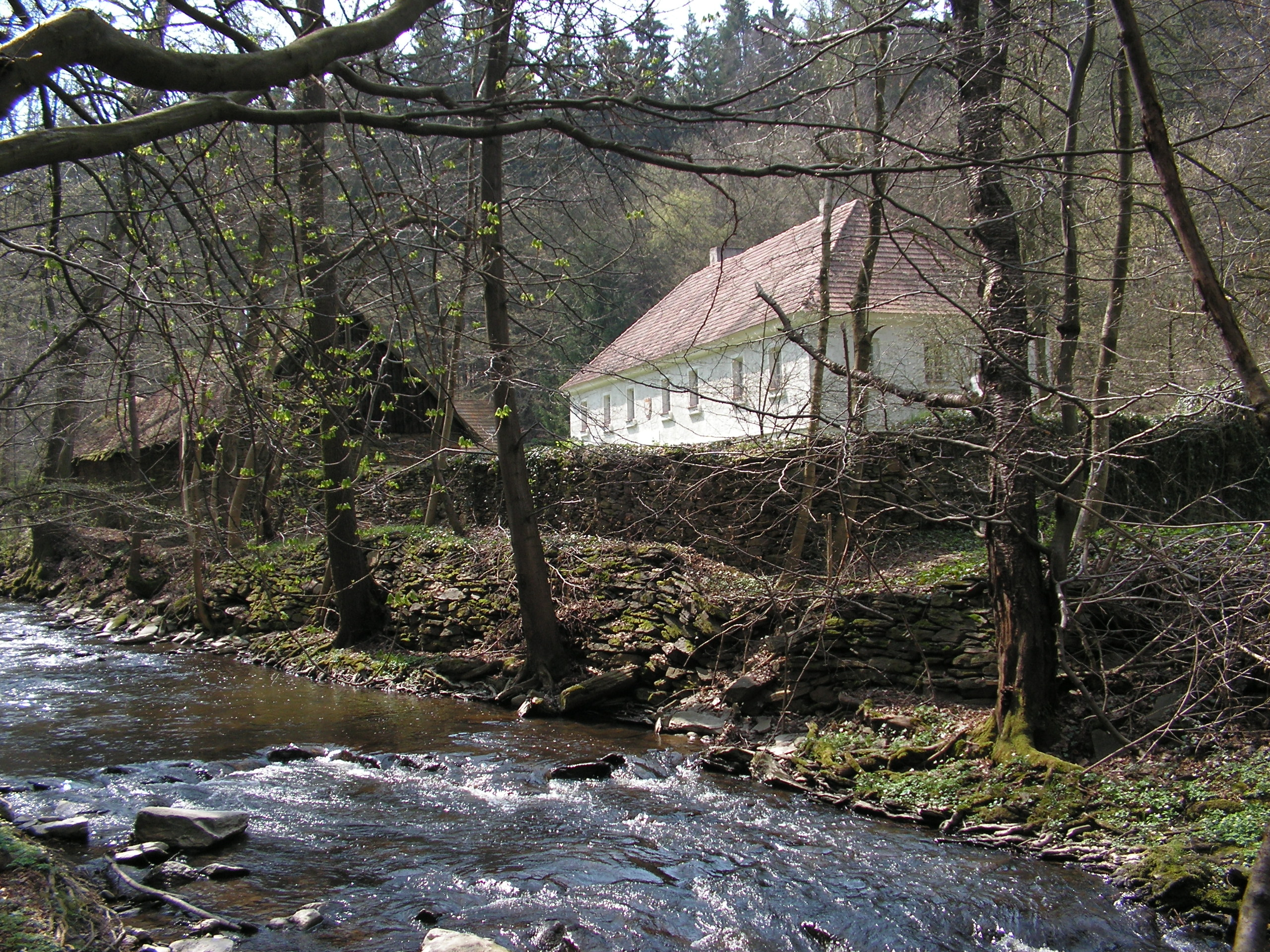 Jánský mlýn na Jánském potoce (Klejnárka).